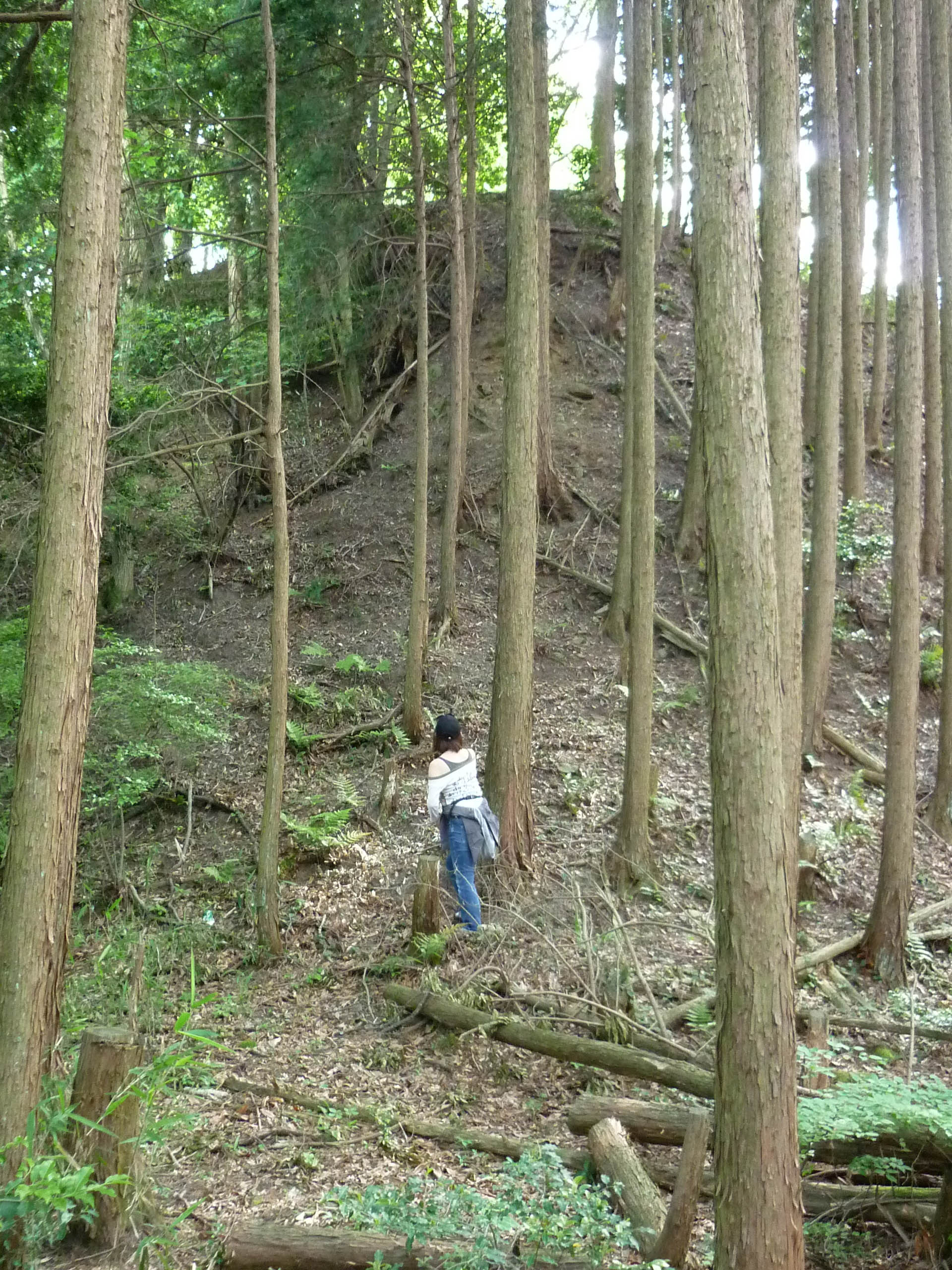 本丸下の崖